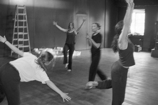 Students of the Theaterakademie performing exercises for body and spatial awareness, 1998